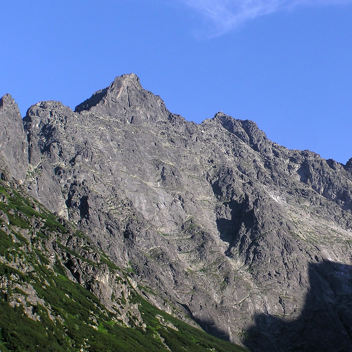 Północno-zachodnia ściana Niżnich Rysów widoczna w całej okazałości w słońcu wczesnego popołudnia. W jej centrum zbiega w dół wyraźna grzęda, dzieląca ścianę na dwie depresje. W jej prawej, dolnej części, ostre cienie rzucają Tomkowe Igły. W grani nad nimi wierzchołek Rysów. W lewej części zdjęcia nieco obcięta zachodnia ściana Żabiego Kapucyna ze spadającą w dół granią Żabiej Lalki. Nad nią kopulaste wzniesienie Kopy Spadowej.